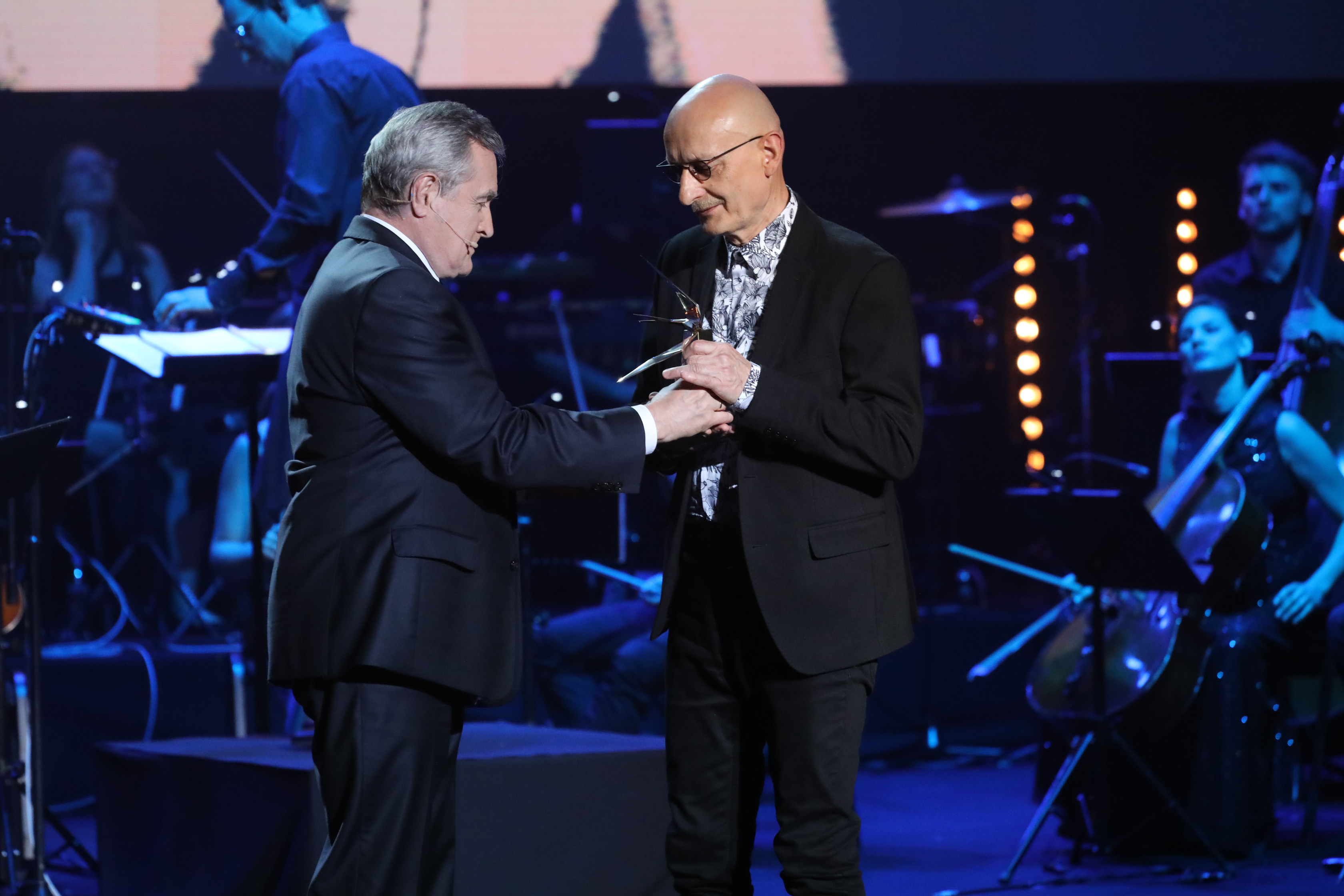 Minister kultury Piotr Gliński i muzyk Sławomir Łosowski.